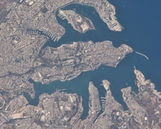 Baie de la Valette, et au centre la péninsule de Xiberras.